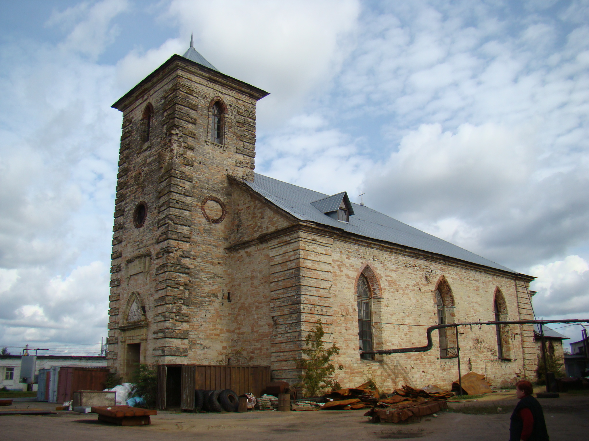 Церковь во имя святого Петра (лютеранская): Ленинградская область, Гатчинский район, Гатчина, ул. Центральная, д. 1